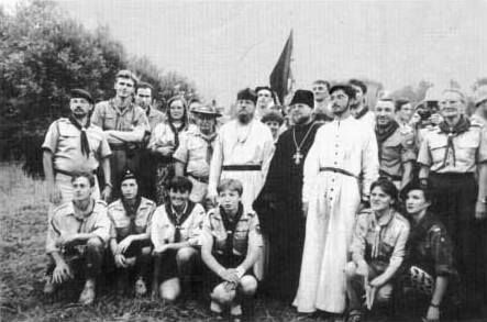 Организация Российских Юных Разведчиков Всероссийский скаутский слет